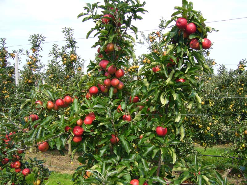 Pommier HoneyCrunch